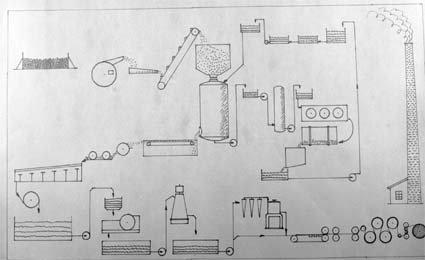 SKJEMA, OVERSIKT I PLANSJE FRA TØMMER TIL PAPIR, TEGNET AV SIGURD TOMTER, KLEVFOS CELLULOSE, ÅDALSBRUK Løten.